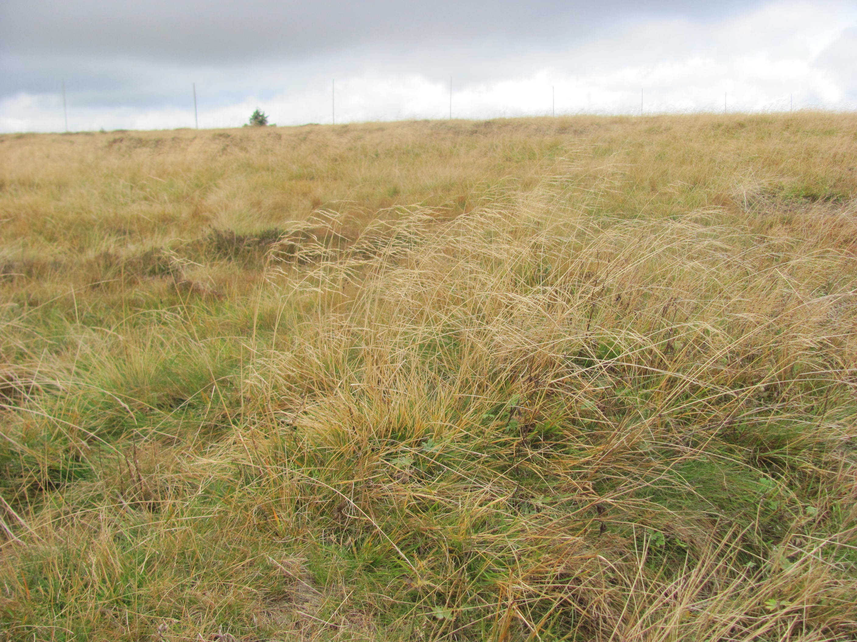 Travní porost na Bílé louce v Krkonoších